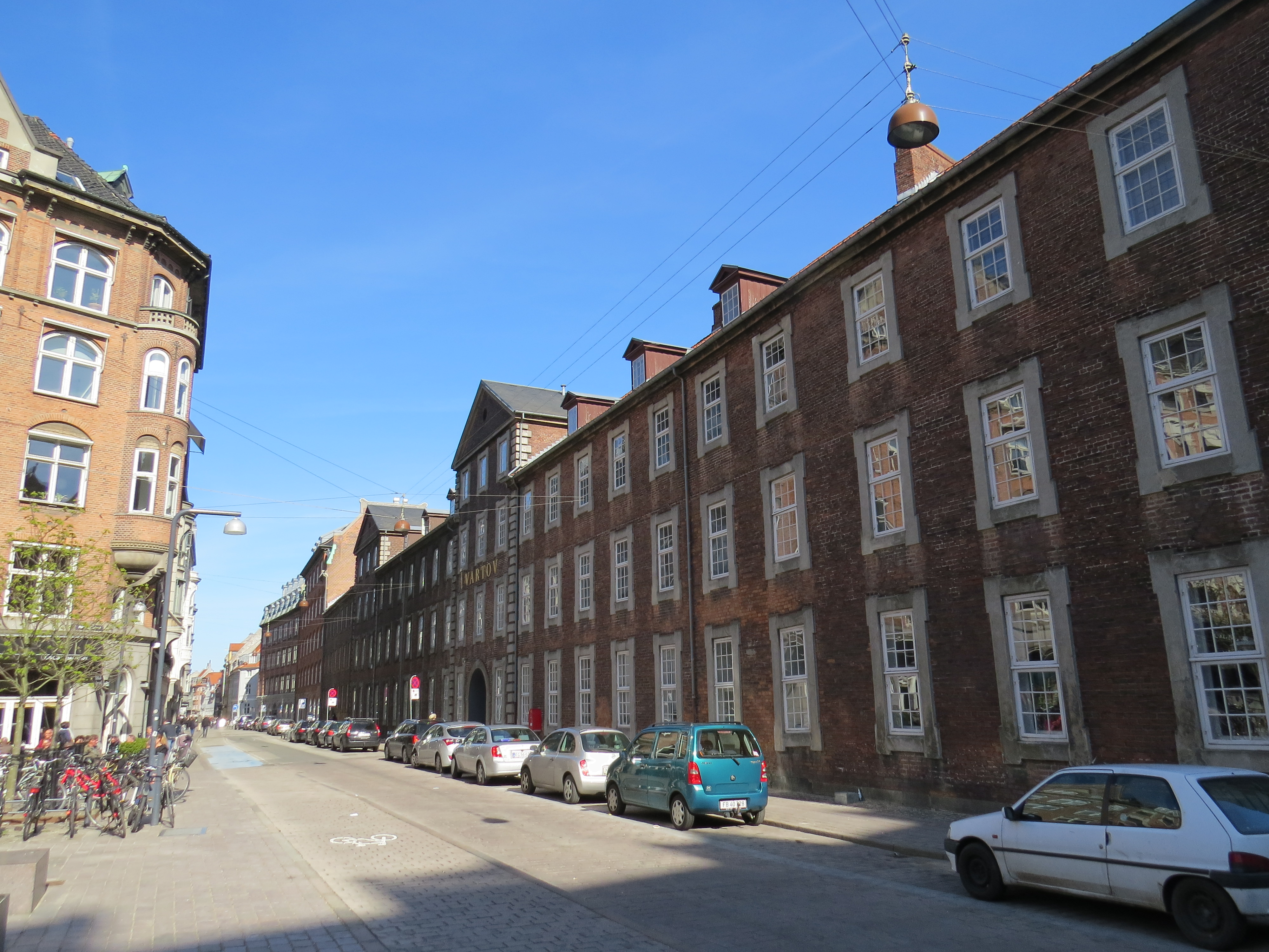 Farvergade, København